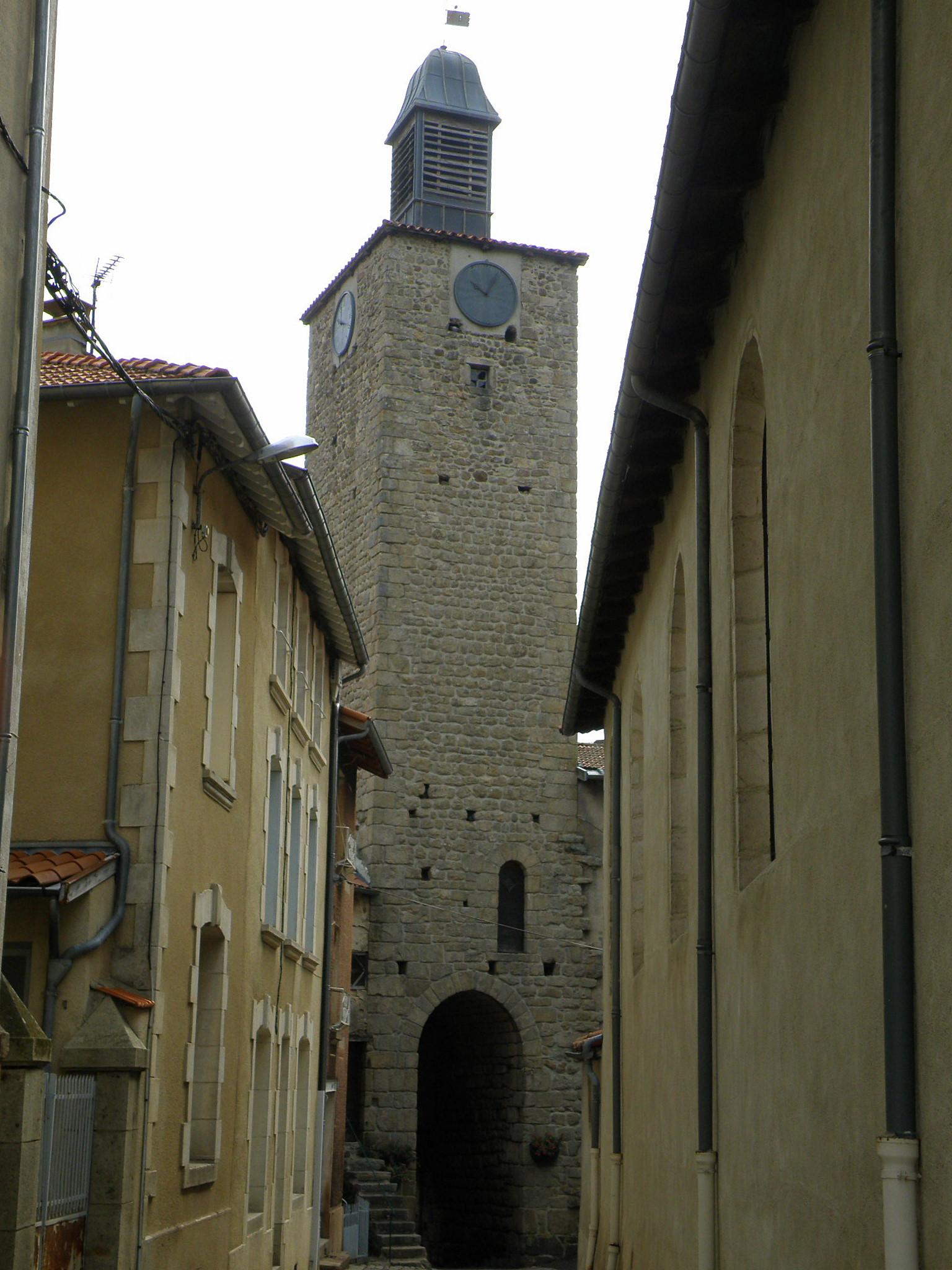 Craponne-sur-Arzon, comm. de la Haute-Loire, France (Auvergne). Le donjon. À droite, flanc nord de l'église Saint-Caprais.